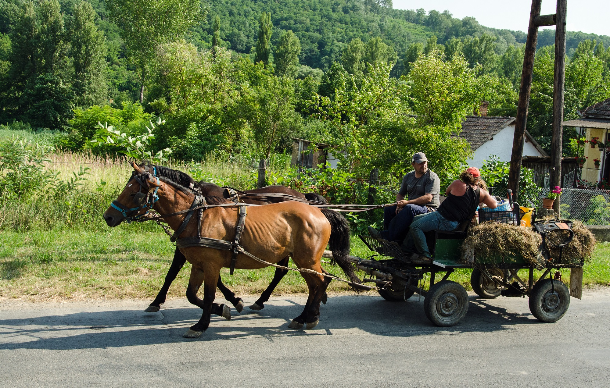 Arbeit in Ungarn